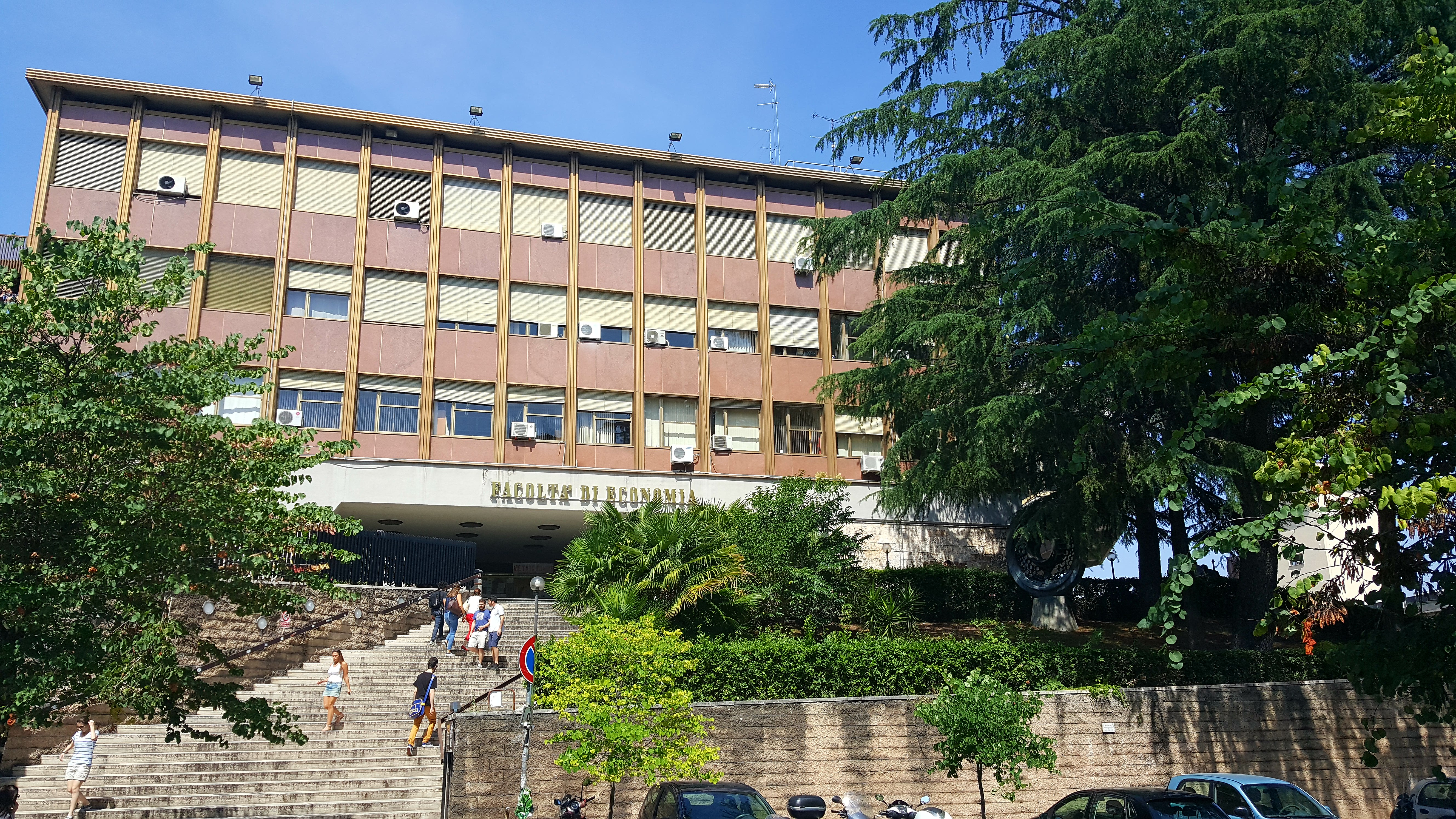 Facoltà di Economia, Università Sapienza di Roma